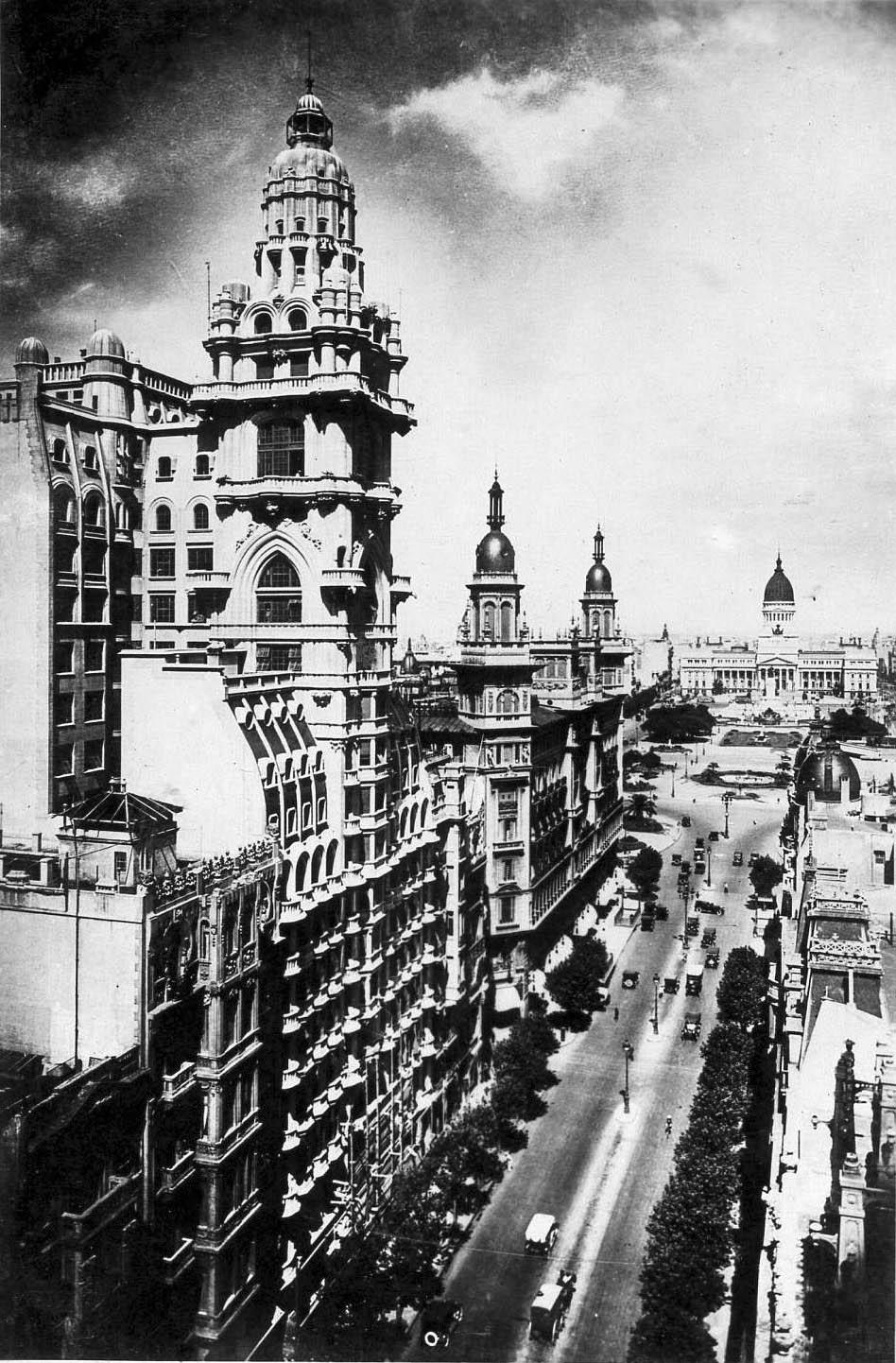 Vista desde la Avenida de Mayo en Buenos Aires del Palacio Barolo, seguido por el Edificio La Inmobiliaria y rematando con la Plaza del Congreso y el edificio del Congreso Nacional.